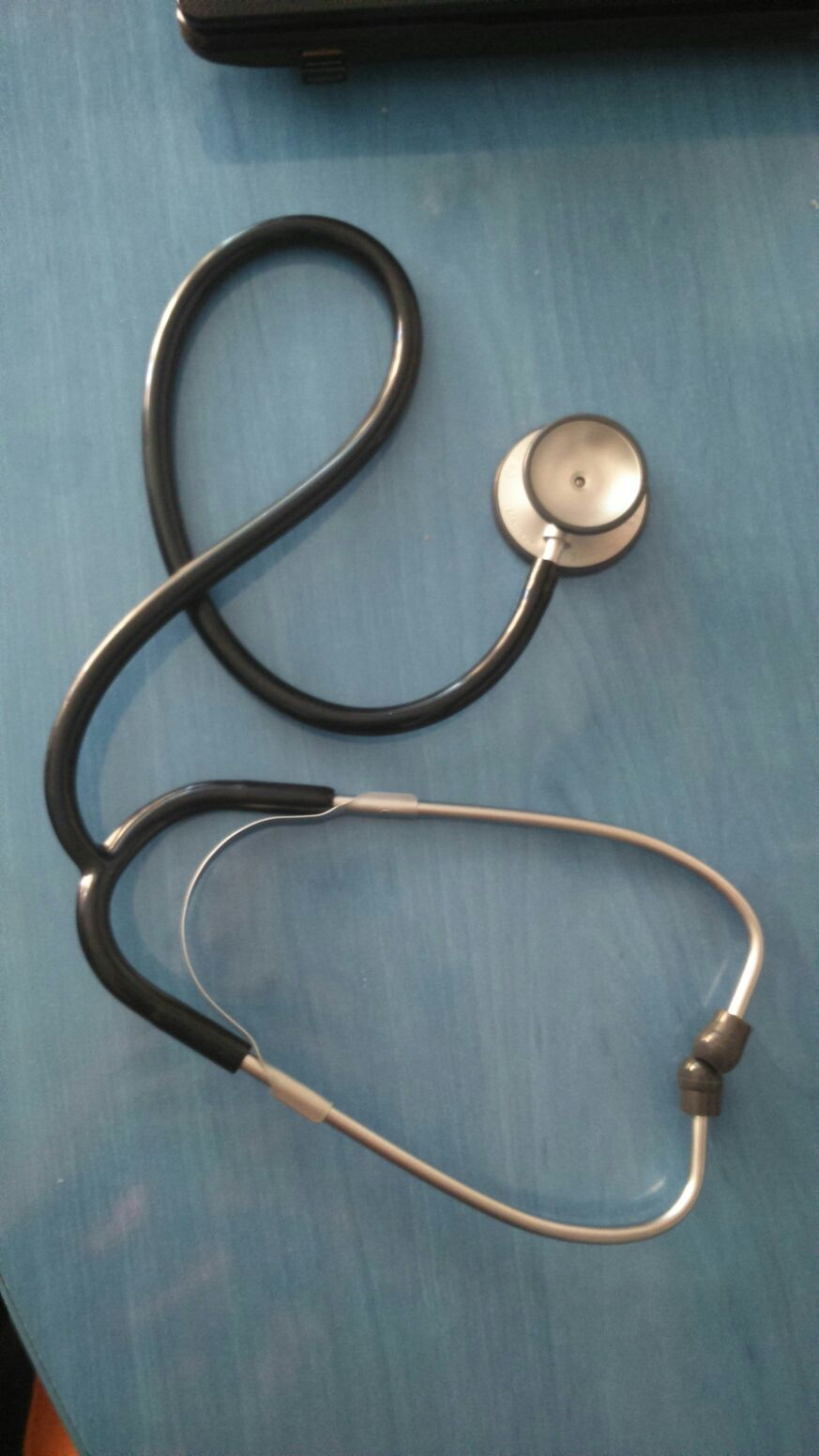 Fonendoskopioa, diafragma eta zuloa azalduz.